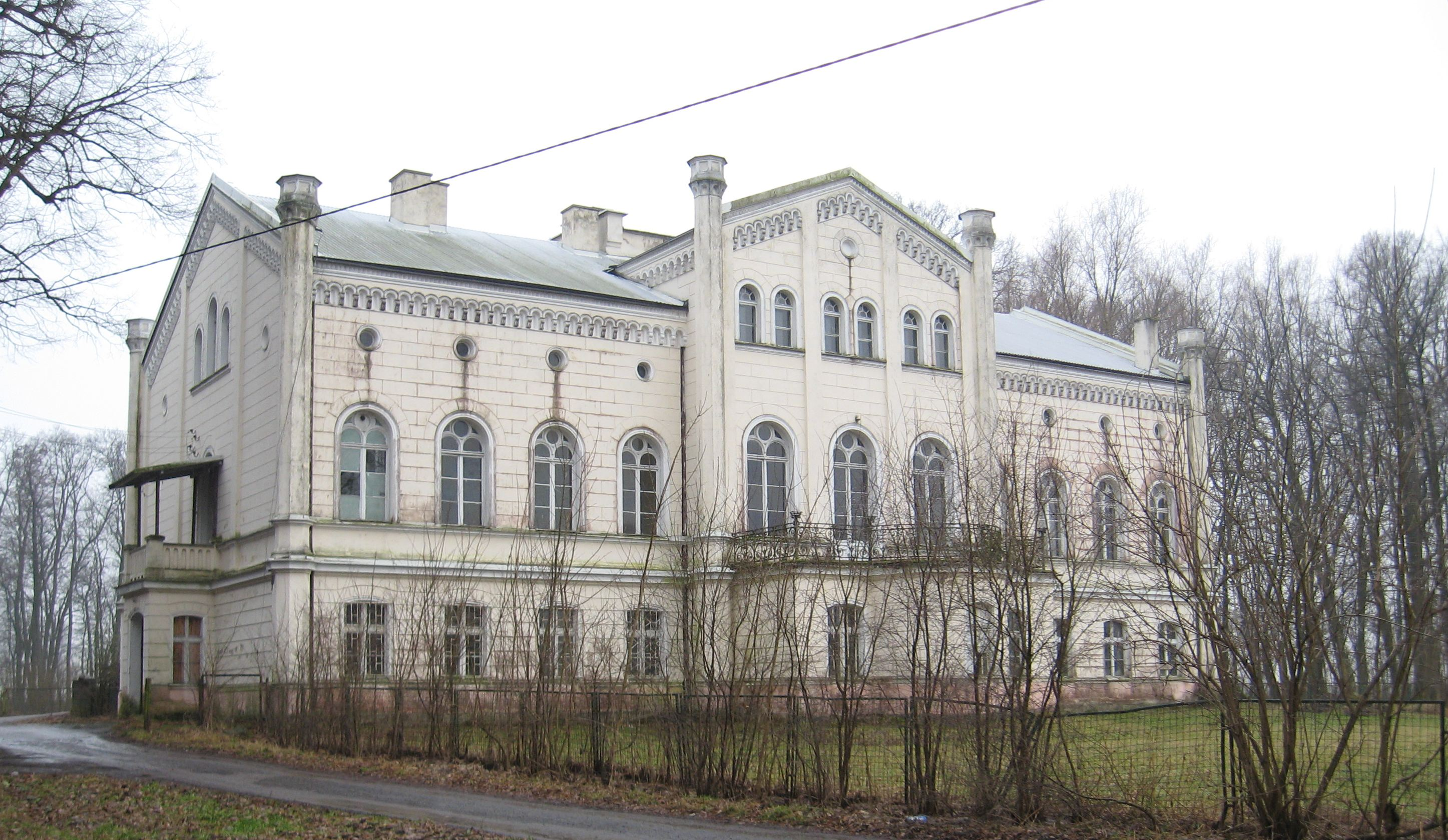 Das Gutshaus in Rodele - OpenStreetMap(Info)